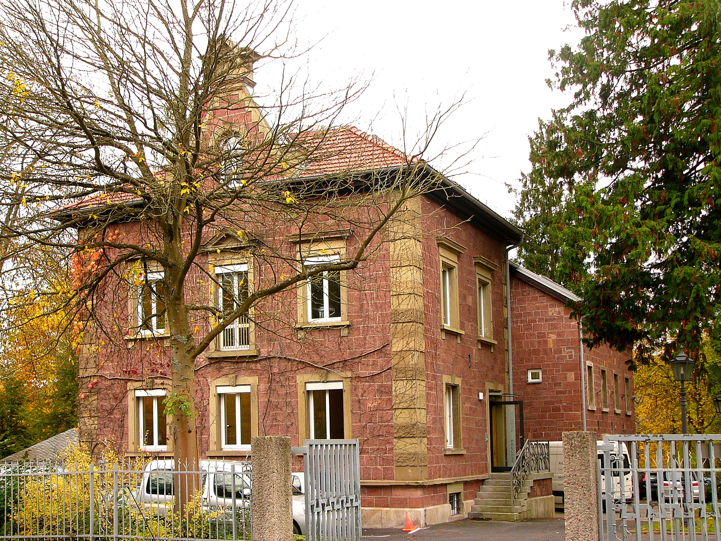 Wohngebäude; zweigeschossiger Rotsandsteinquaderbau mit abgeschnittenem Walmdach, Grausandsteingliederung, sowie südlichem Zwerchhaus mit Ziergiebel, gleichzeitig. This is a photograph of an architectural monument.